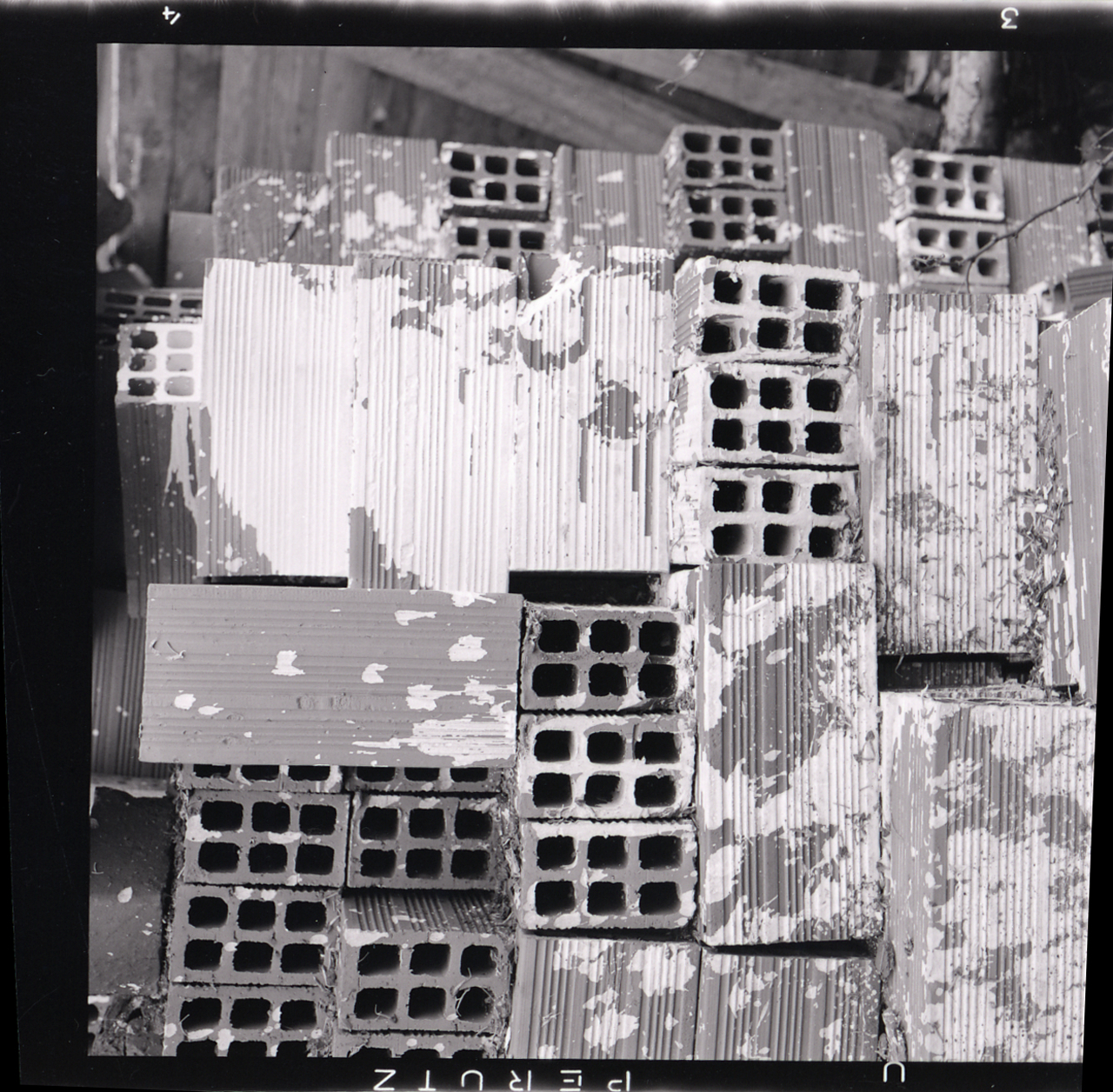 Serie fotografica : Anzola d'Ossola, 1964 / Paolo Monti. - Buste: 23, Fototipi: 23 : Negativo b/n, gelatina bromuro d'argento/ pellicola ; 6x6. - ((Serie costituita da 23 buste di negativi identificati con i nn.: 17447, 17448, 17449, 17450, 17451, 17452, 17453, 17454, 17455, 17456, 17457, 17458, 17459, 17460, 17461, 17462, 17463, 17464, 17465, 17466, 17467, 17468, 17469, e tenute insieme da una graffetta. - La busta R 17447 riporta l'iscrizione: "Az./ ago - giu 64".